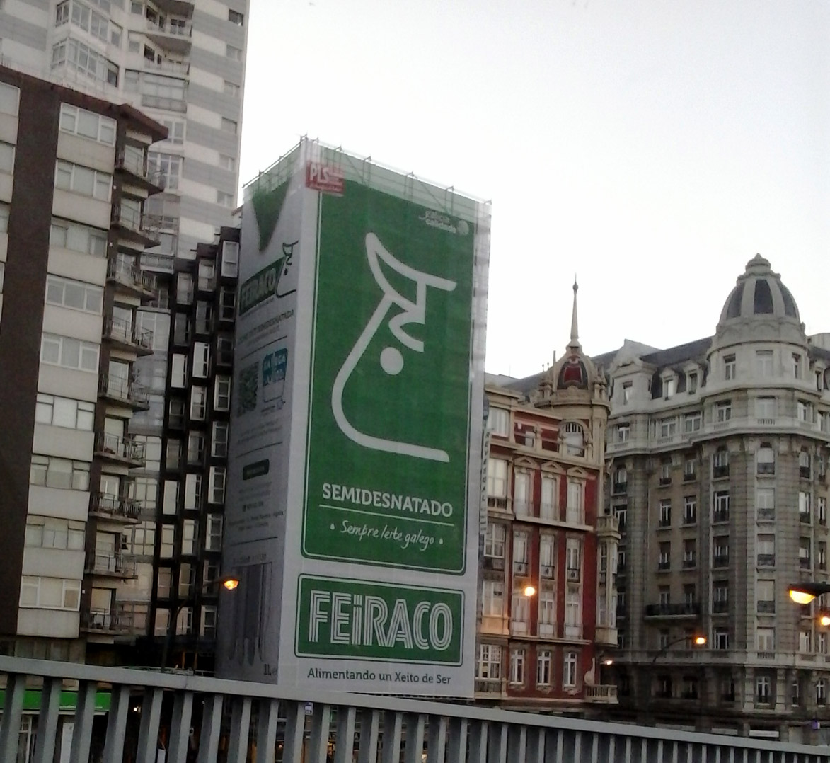 Publicidade de Feiraco na Coruña